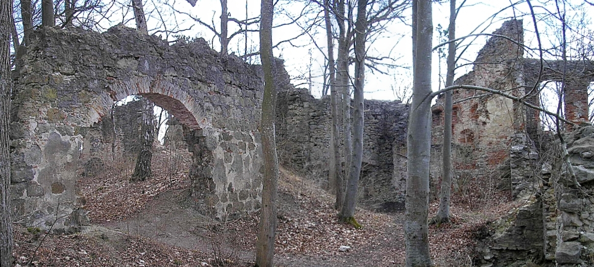 Burg Hochhaus bei Nördlingen (Landkreis Donau-Ries, Bayerisch-Schwaben). Der Westteil der Burgruine. Blick nach Südosten. Eigene Aufnahme, April 2006. Hochhaus castle near Noerdlingen (Bavaria, Germany). Western part of the castle. Looking south east.